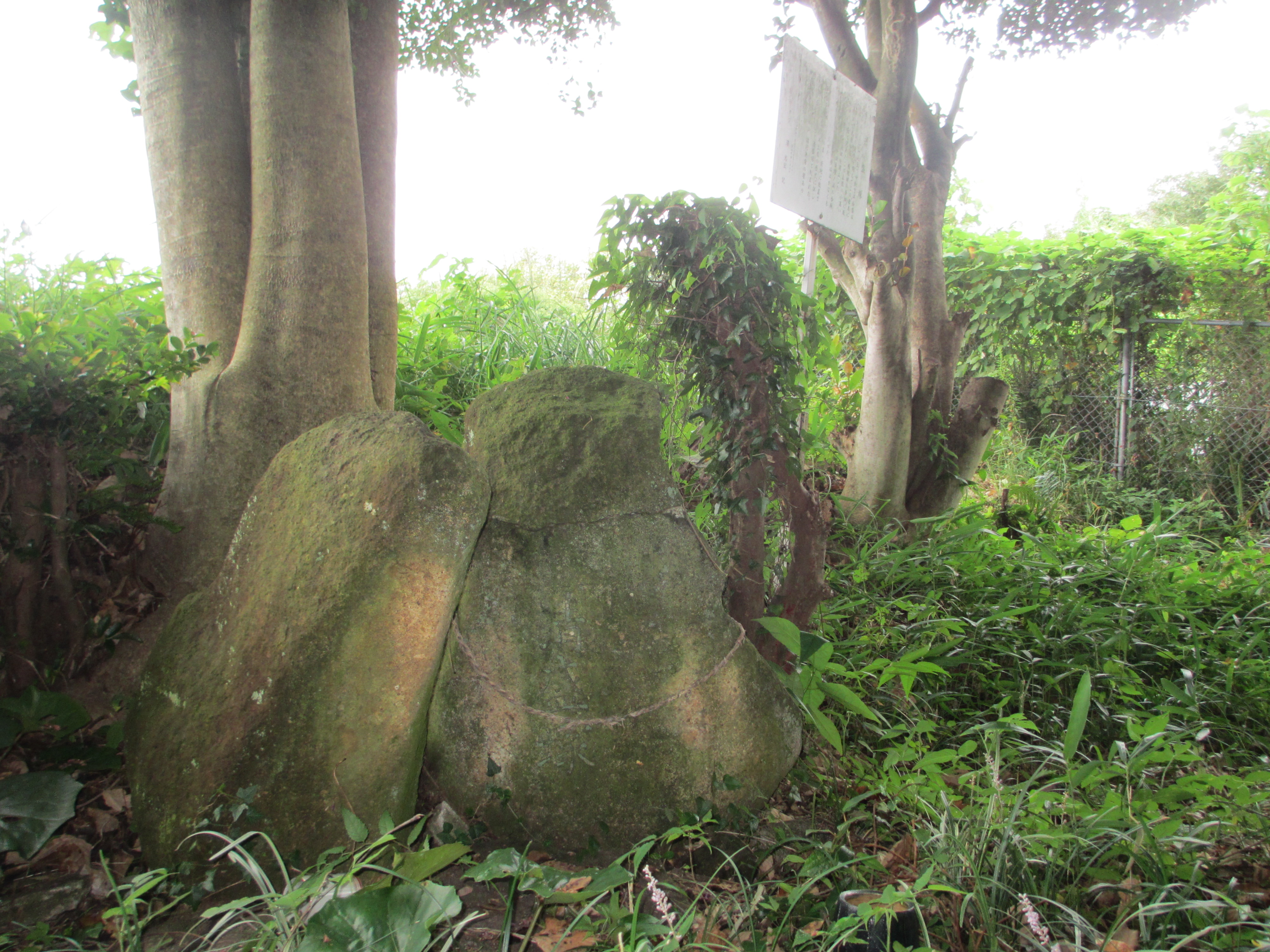 JR下関駅バス杉田停留所から案内標識あり、刻まれた文字は後世のもの